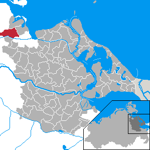 Wackerow, Landkreis Ostvorpommern, Mecklenburg-Vorpommern